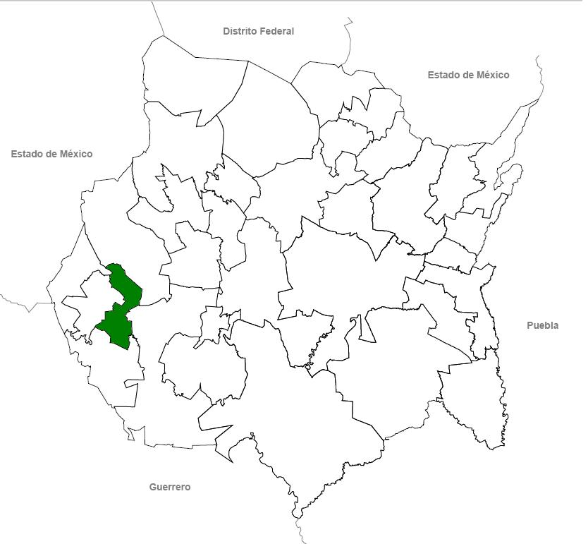 Localización de Mazatepec en el estado de Morelos.